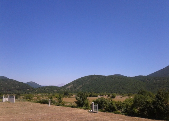 Foto panoramica della Vallelonga